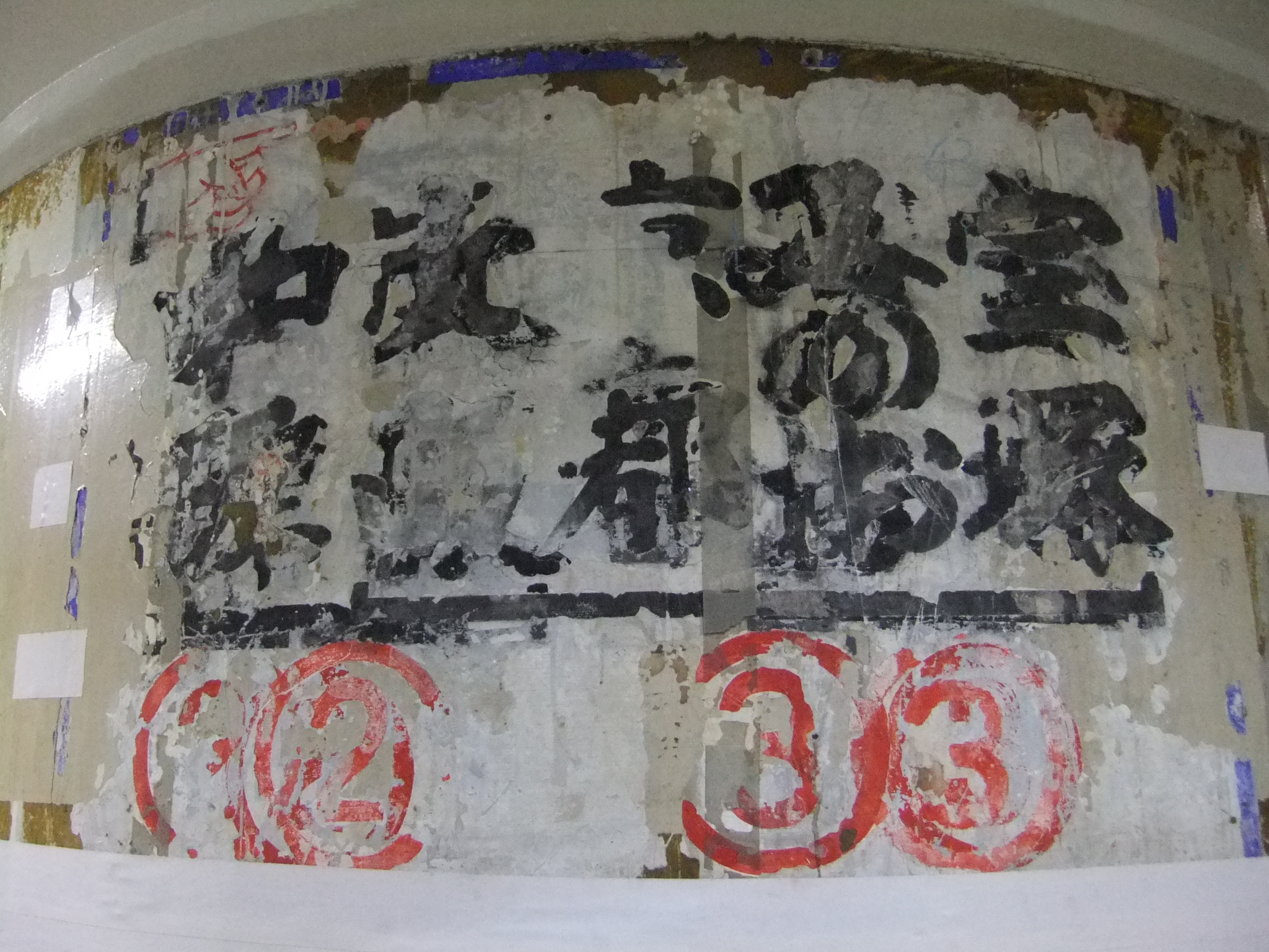 十三駅の乗車案内。昭和30～34年ごろのもの。現2番線側。